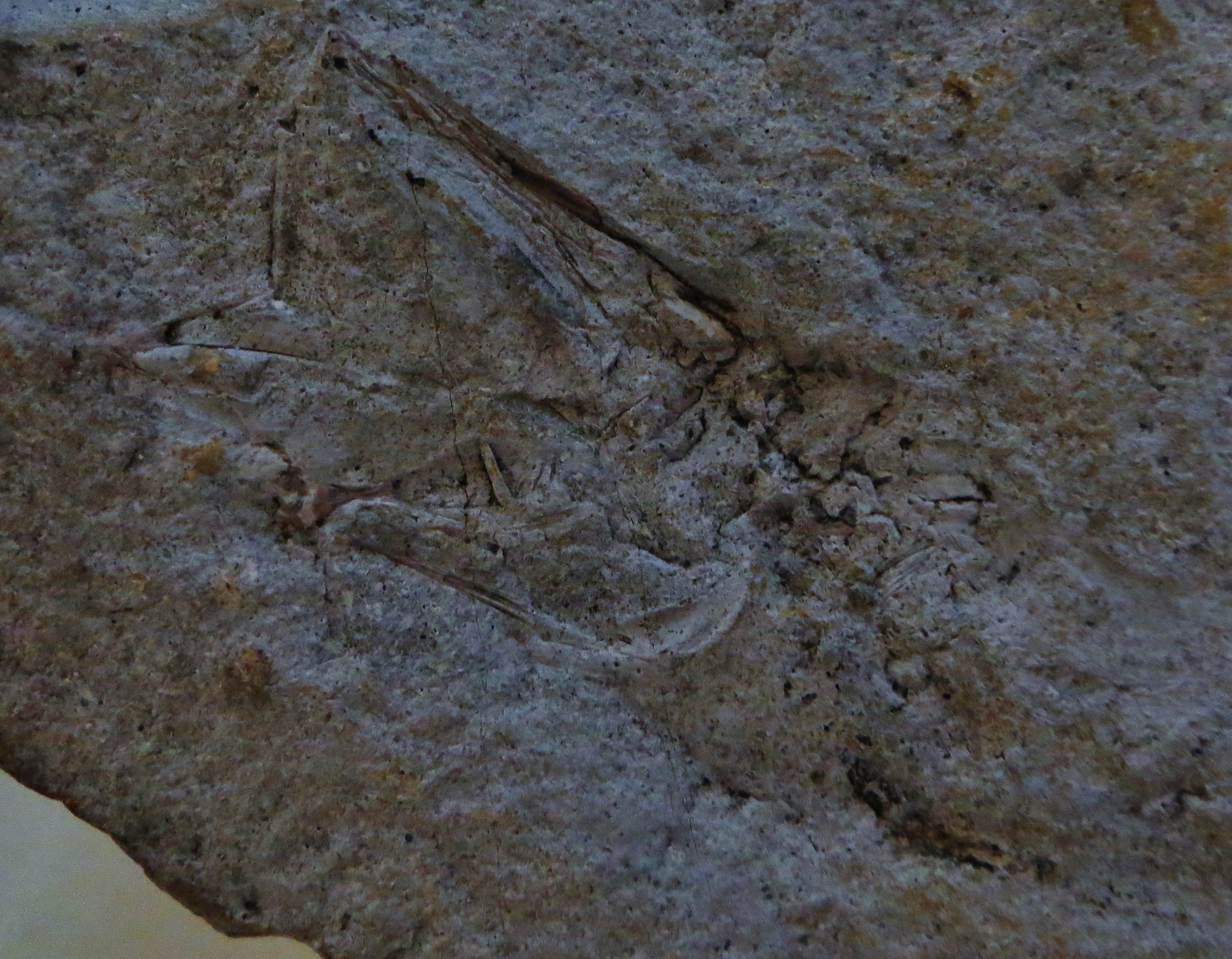 Fossil of Echidnocephalus- Took the picture at Teylers Museum, Haarlem